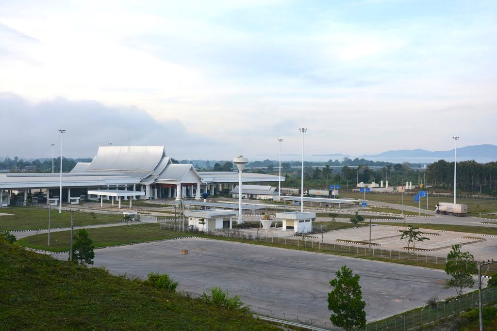 友好橋（ラオス側）